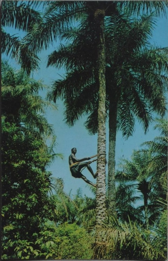 Postcard: FotoSerra No 146 - Homem que extrai o chabéu